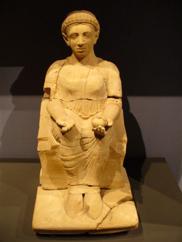 riproduzione di uomo etrusco con melograno in mano, museo di Chiusi SI